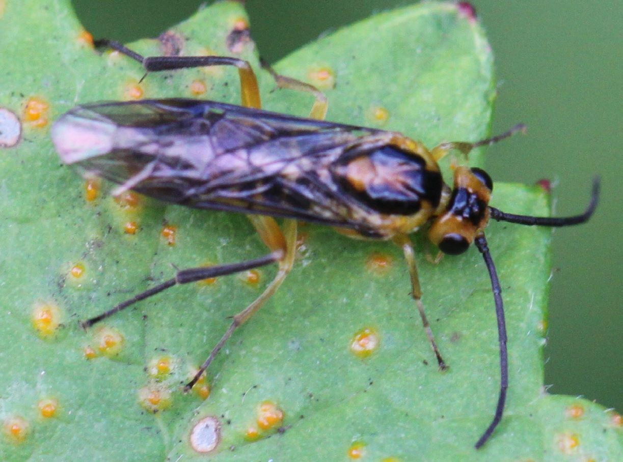 Nematus tibialis am 6.9.2017 in der Schwetzinger Hardt